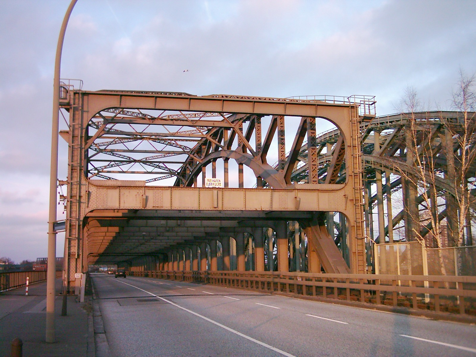 Die Freihafenelbbrücke über die Norderelbe in Hamburg.